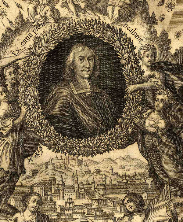 Fürsterzbischof Johann Ernst von Thun, Salzburg - Frontispiz zum Druck "Votum Unanime Parnassi Salisburgensis Deorum Iudicio Et Assensu Approbatum", Salzburg 1687 (Signatur UB Salzburg R 1872 II)